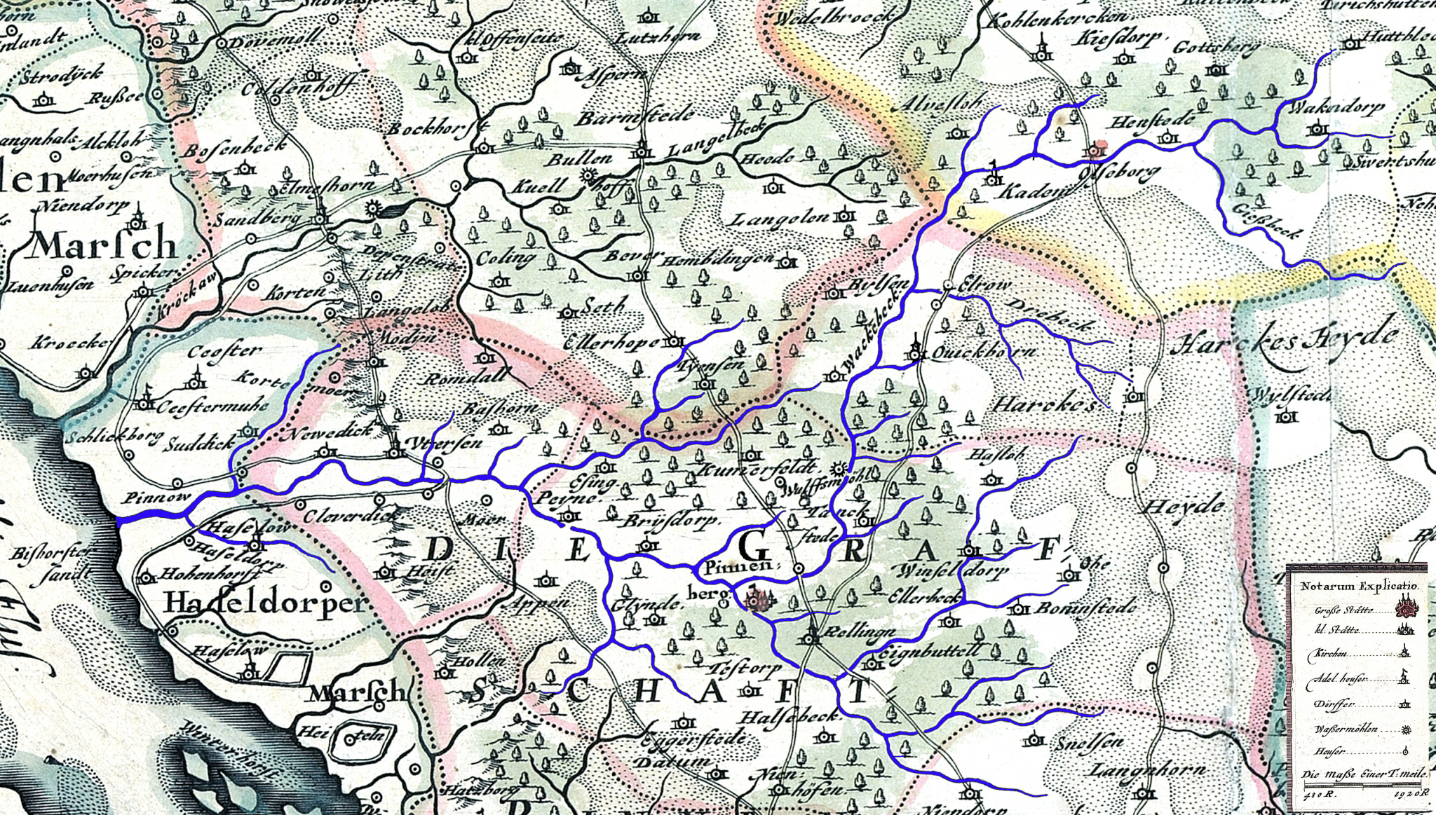 Die Pinnau, Ausschnitt aus der "Landtcarte des Fürstenthumbe Stormarn" von Johannes Mejer (* 1606 Husum; † 1674 Husum) aus dem Jahr 1650. Pinnau nachträglich Blau eingefärbt am 07.05.2009 von Huhu Uet